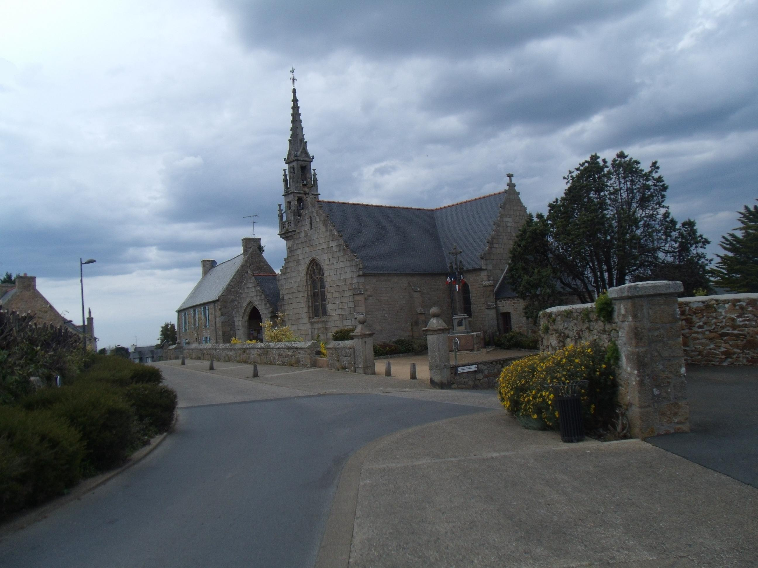 Église Saint-Léonore-et-Sainte-Anne de Trélévern